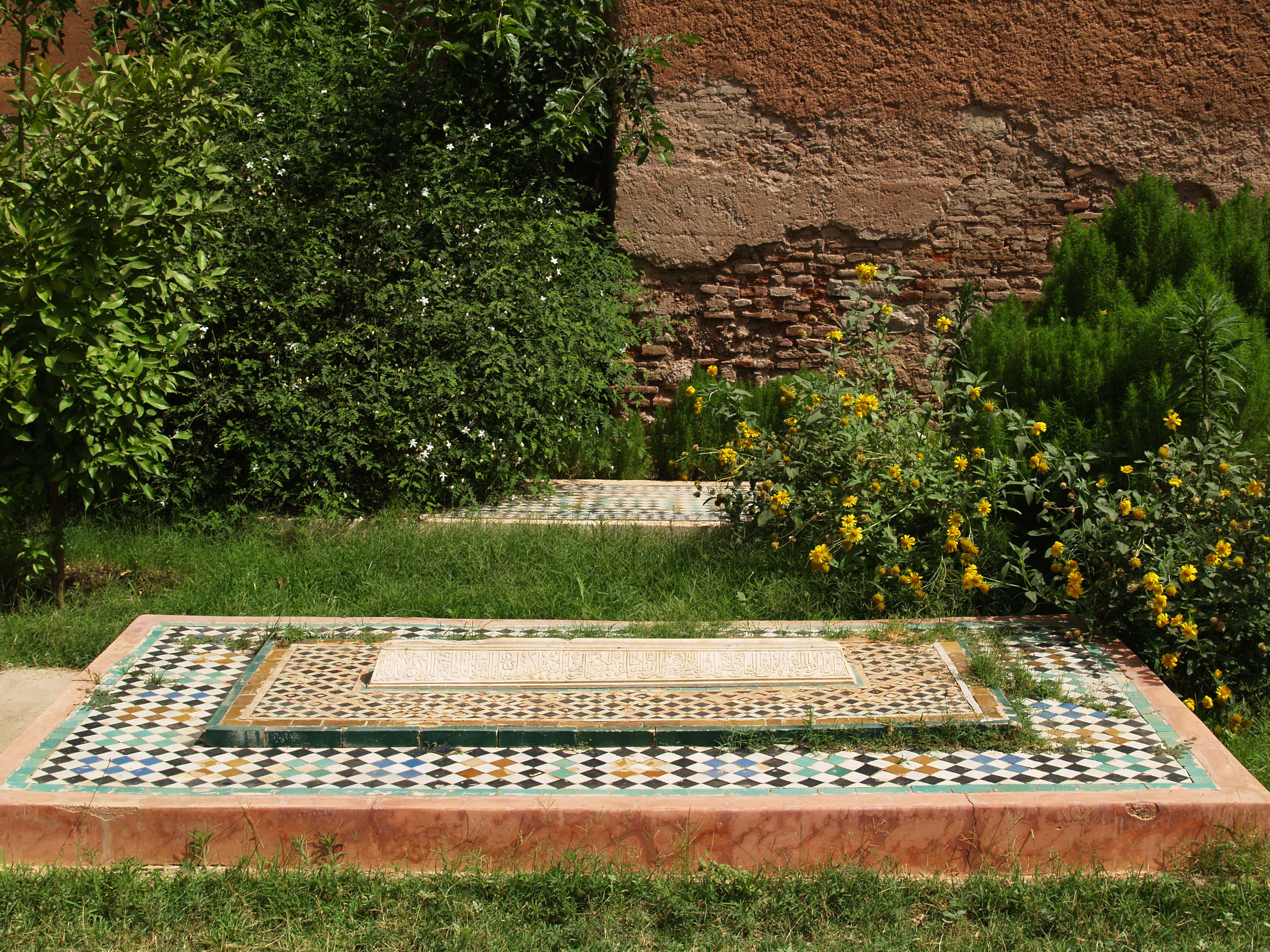 Marrakech, Mausoleos sadíes, ss. XVI-XVII.